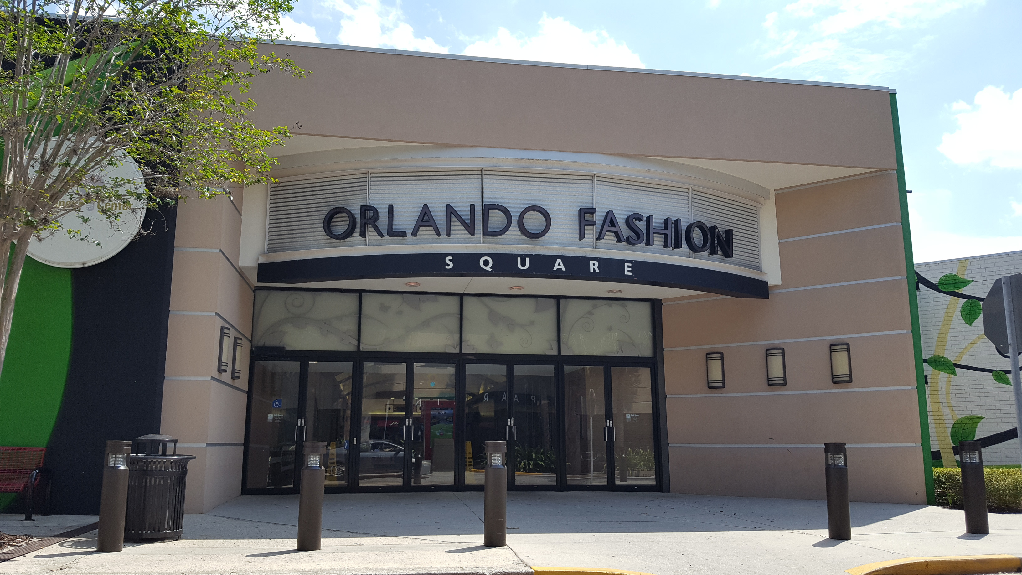 Orlando Fashion Square Orlando, FL April 2017